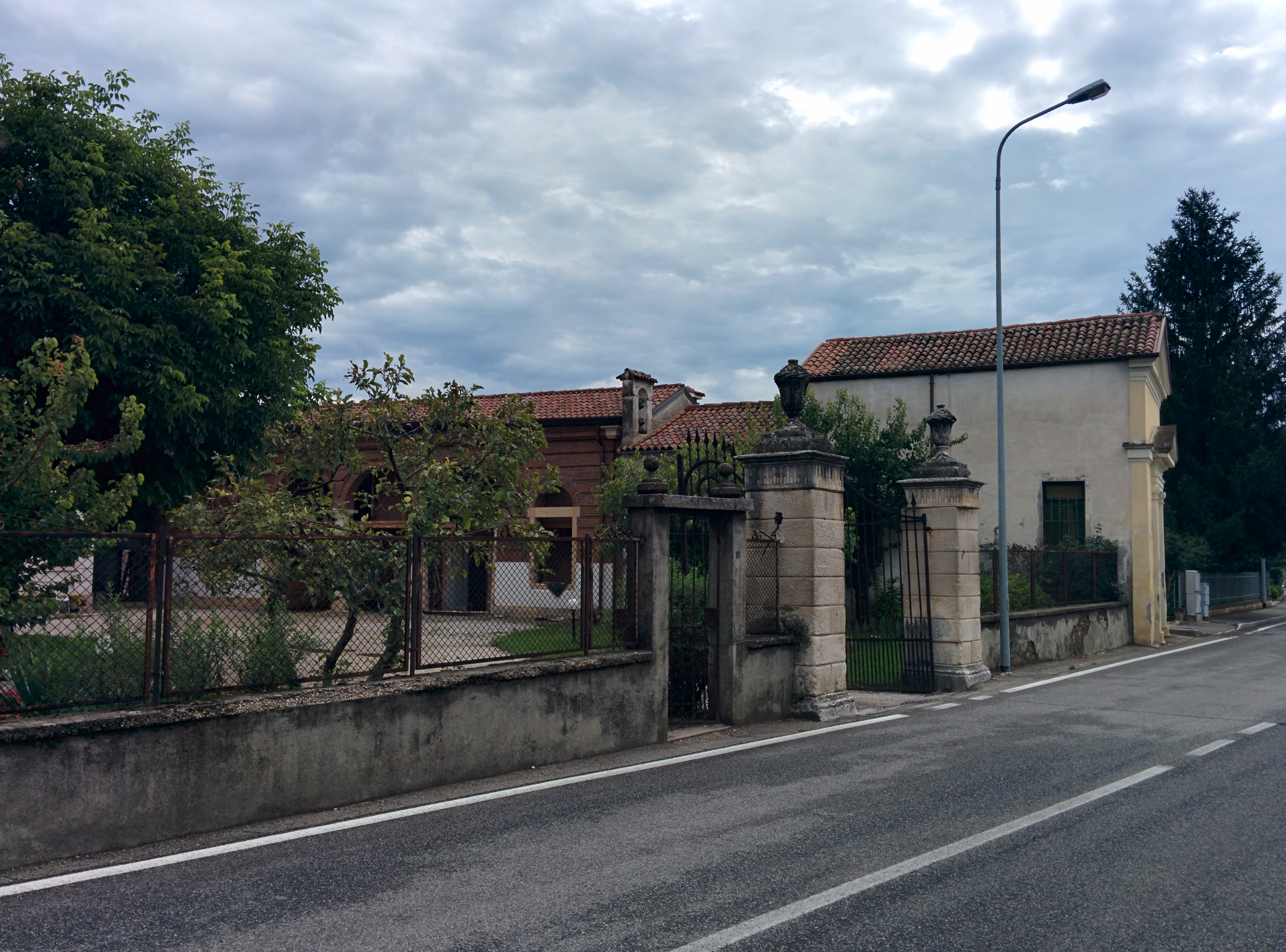 Lato verso la Villa Fogazzaro-Arnaldi della chiesetta dedicata alla Maternità di Maria a Caldogno, provincia di Vicenza.